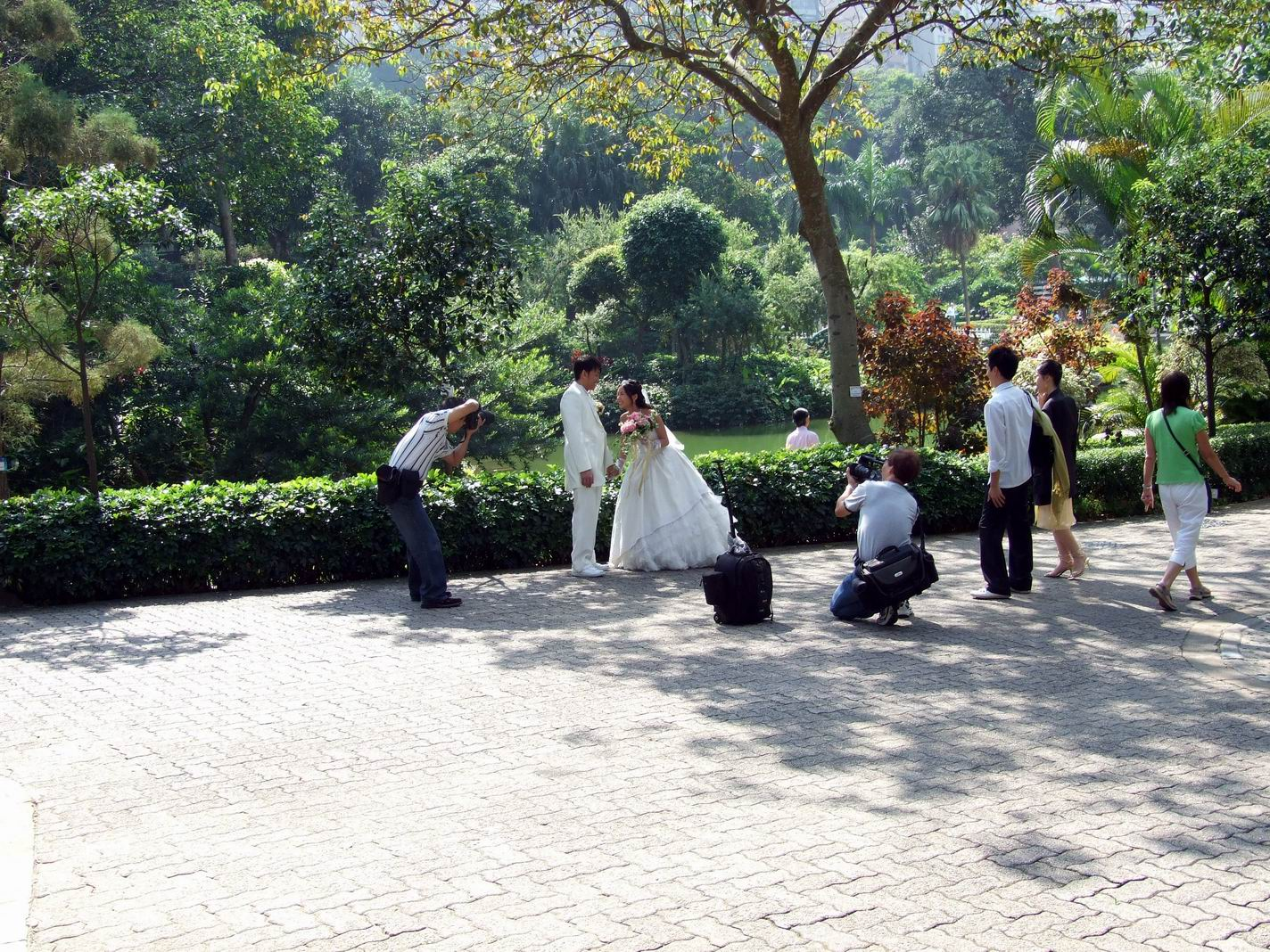 香港公園拍攝結婚照片